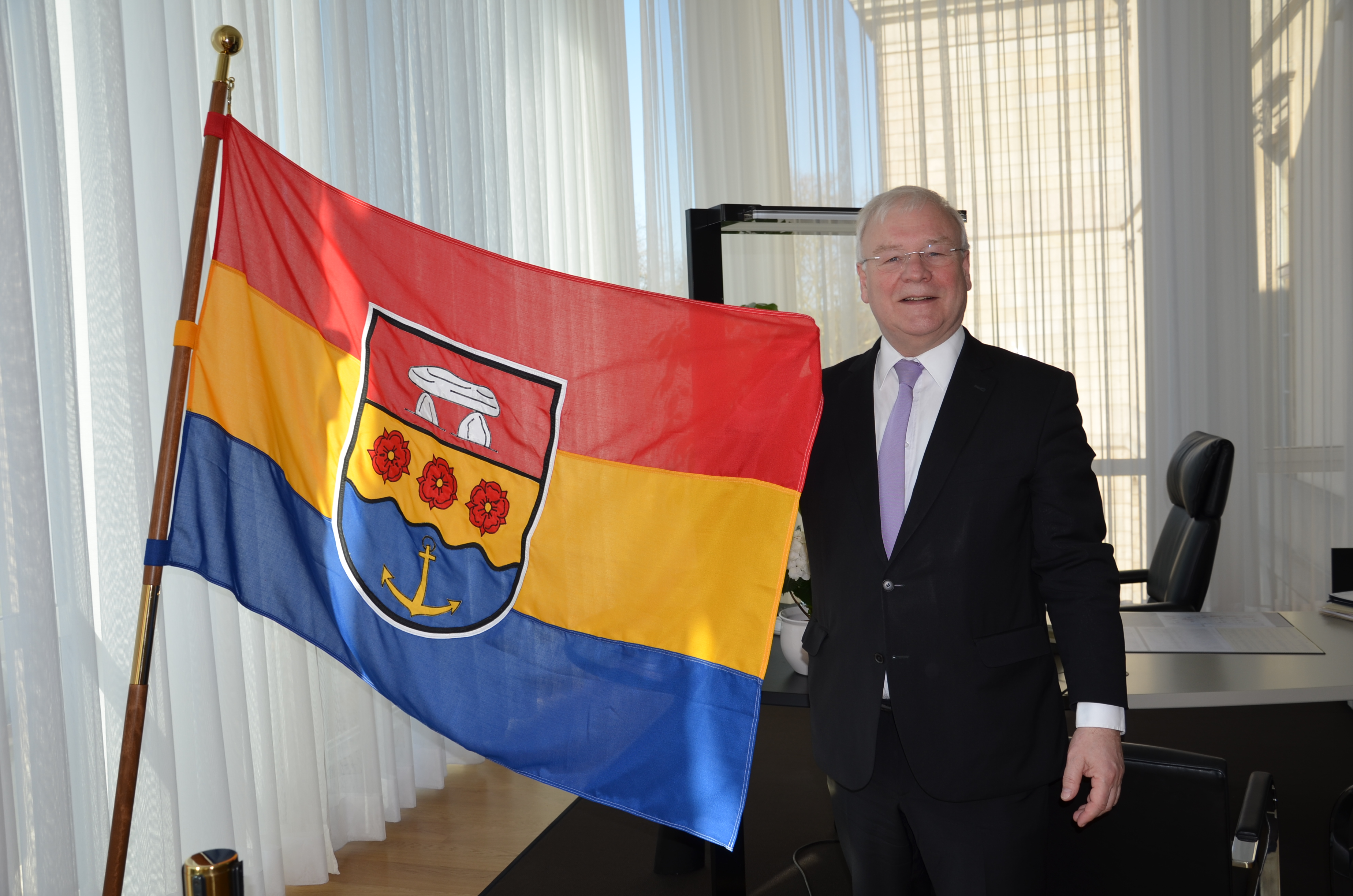 Bernd Busemann, Präsident des Niedersächsischen Landtages präsentiert am Tag der offenen Tür in seinem Büro die Flagge des Landkreises Emsland ...